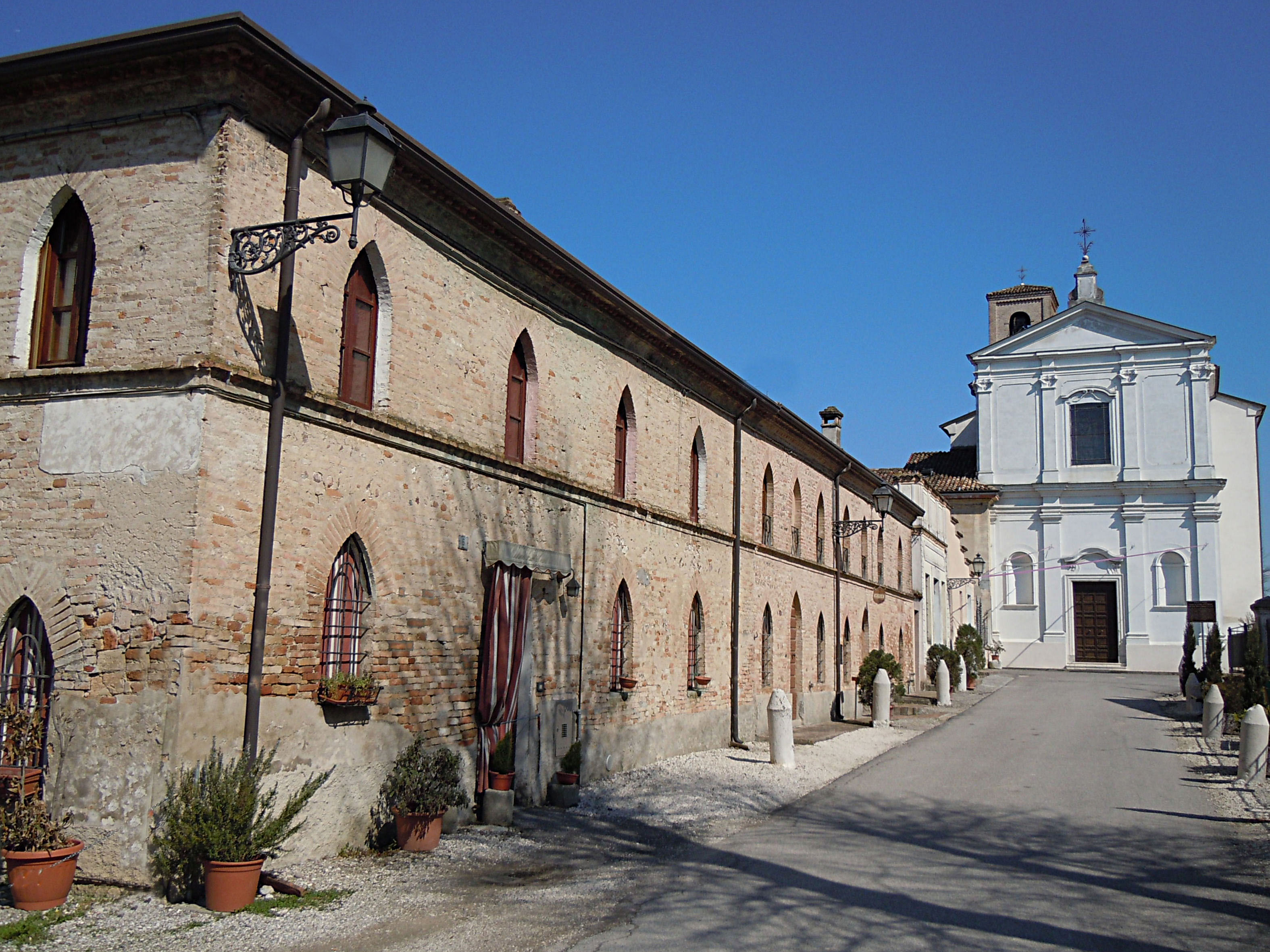 San Martino Gusnago, Casa di Piazza.